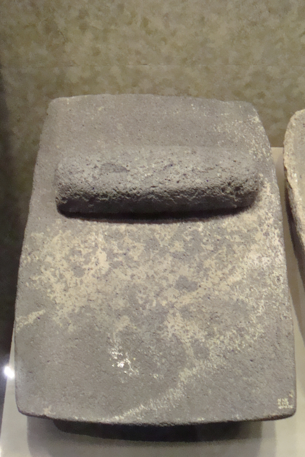 Metate encontrado en Terremote Tlaltenco (México), que fue una aldea agrícola del Preclásico Medio mesoamericano (ss. XV-III a. de C.).